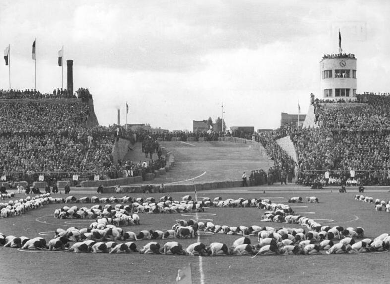 Zentralbild Junge 12.5.1955 VIII. Internationale Friedensfahrt Prag Berlin-Warschau 1955. 8. Etappe von Leipzig nach Berlin über 200 Km. UBz: Vor der Ankunft unserer Friedenfahrer im Berliner "Walter-Ulbricht-Stadion" zeigten Schülerinnen und Schüler der Berliner Schulen vor über 70000 Zuschauern eine Massengymnastik.